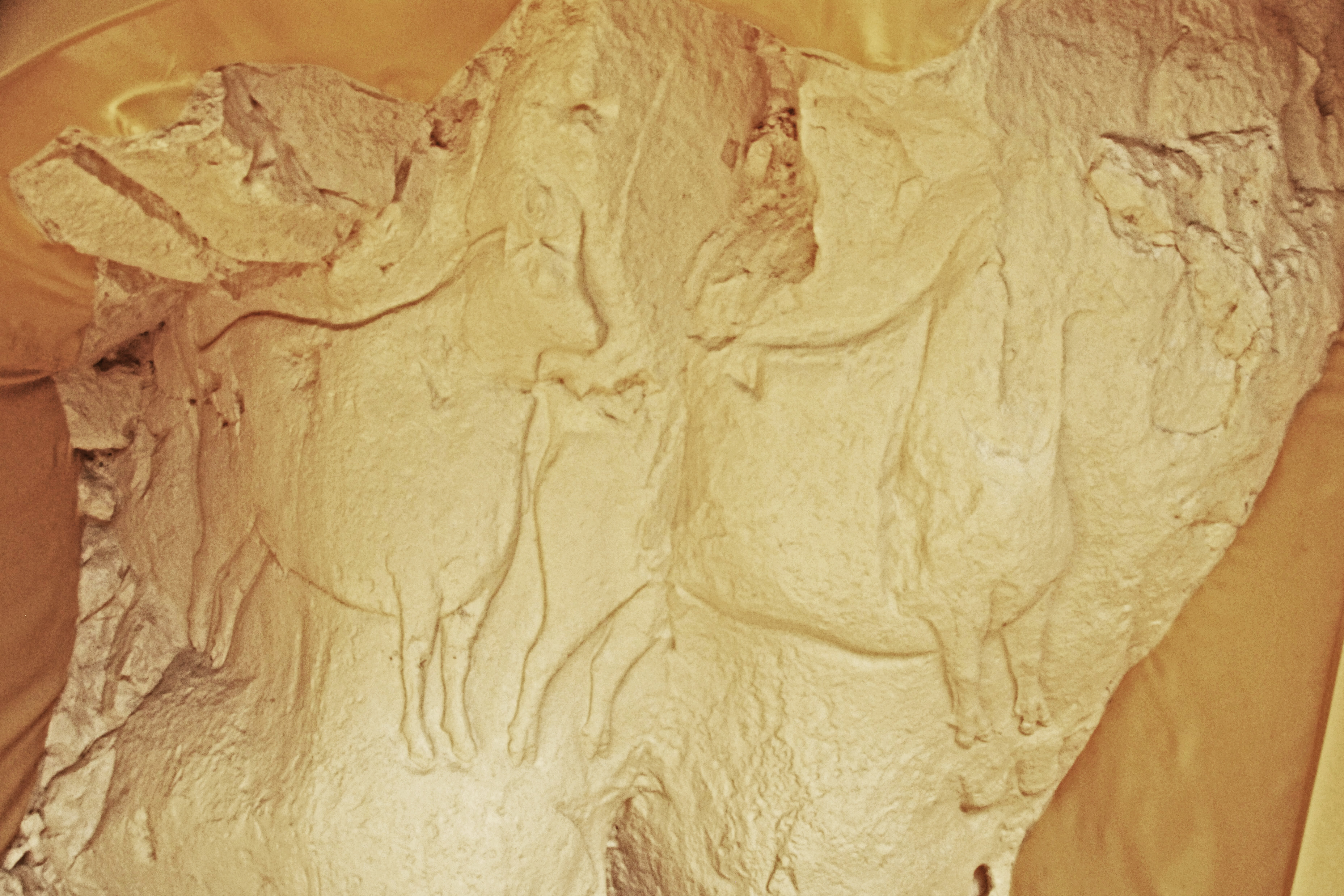 Angles-sur-l'Anglin, Museum, Skulpturen